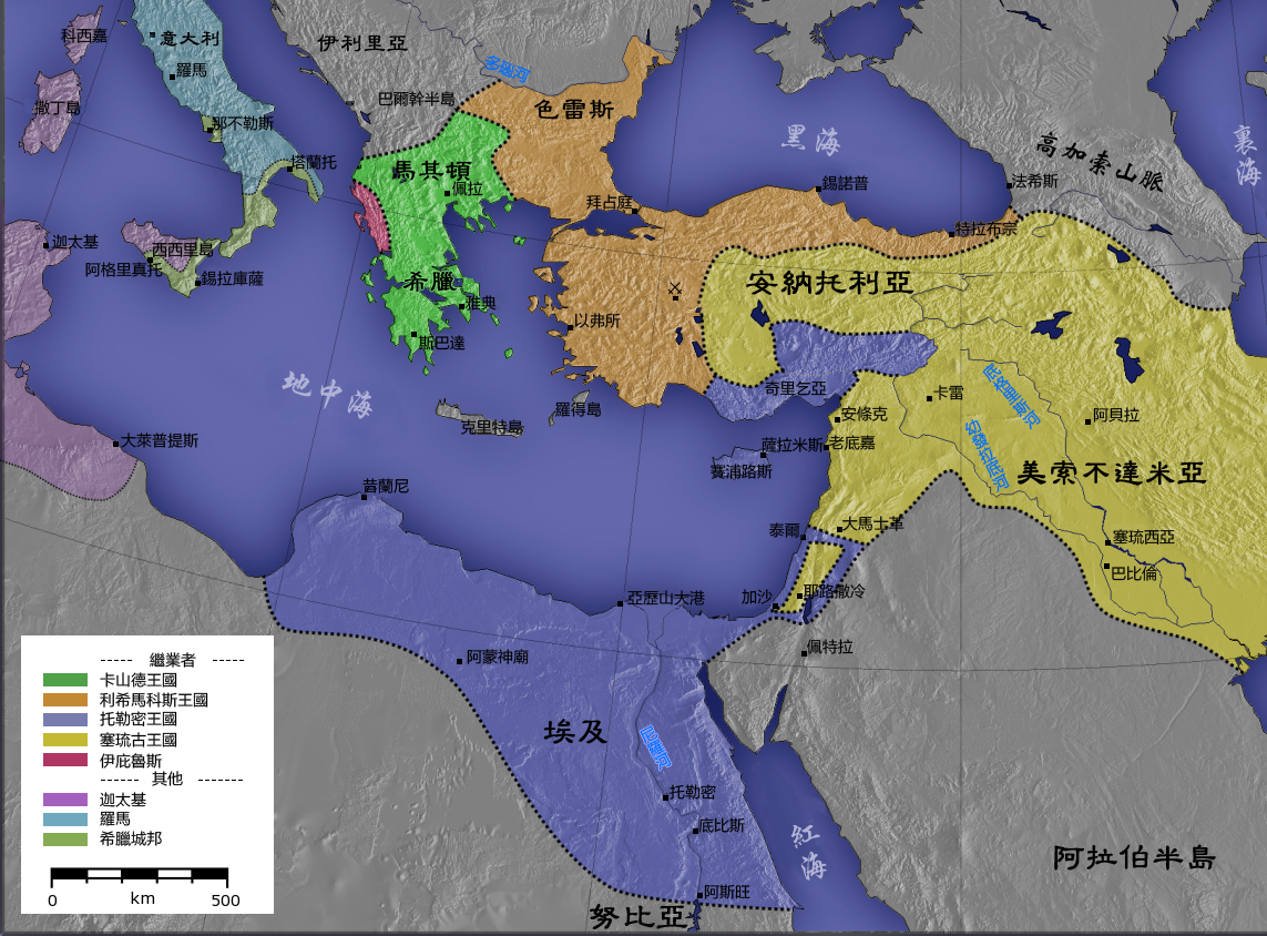 托勒密王國疆界